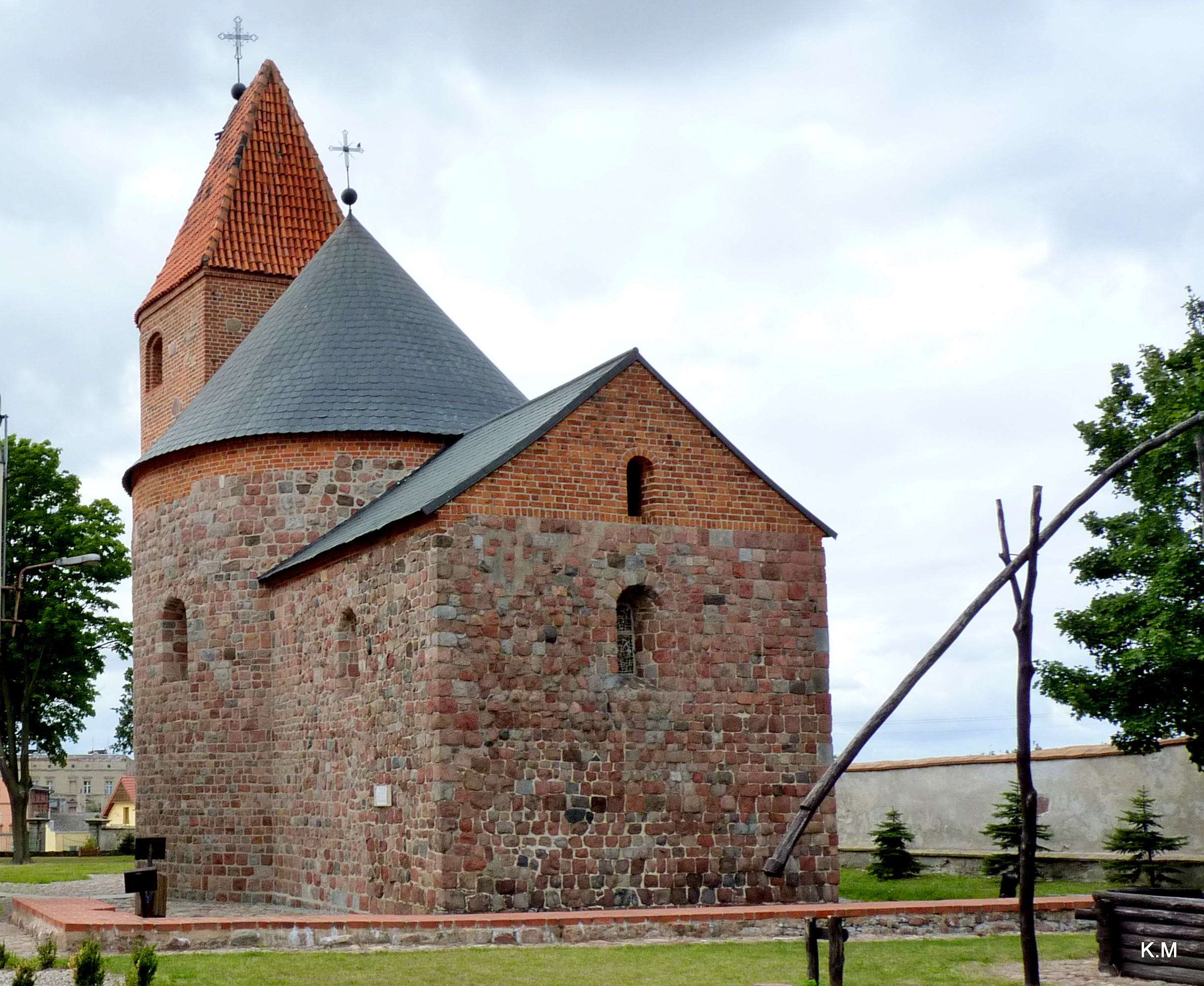 2012- Rotunda św. Prokopa w Strzelnie